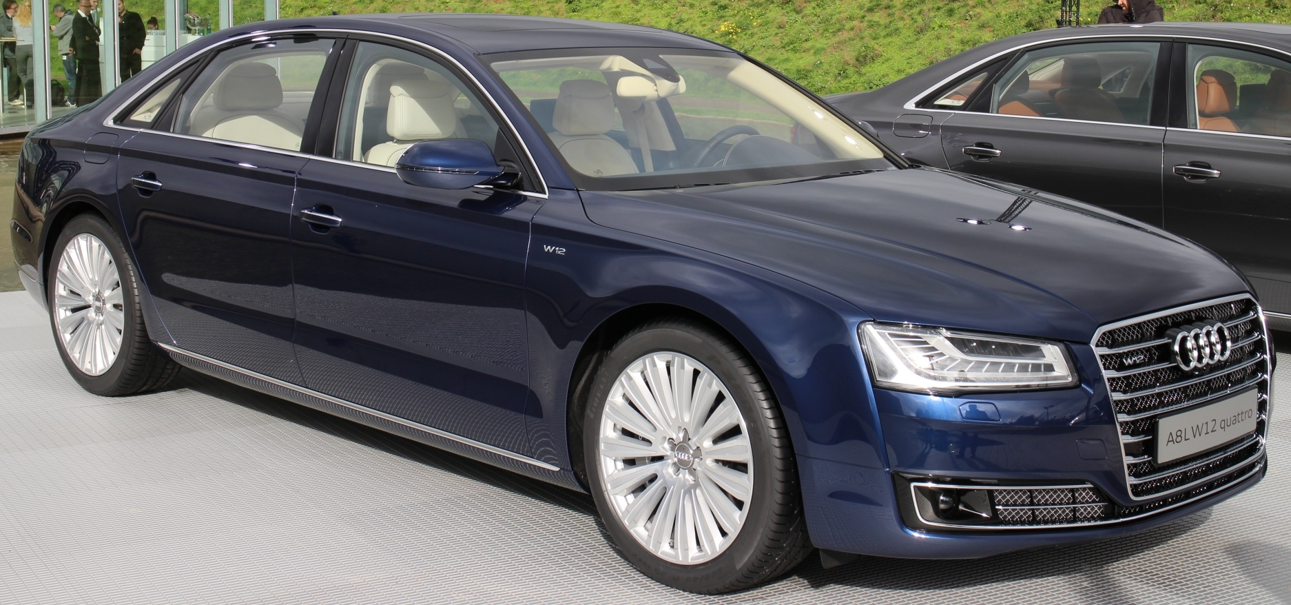 Facelift